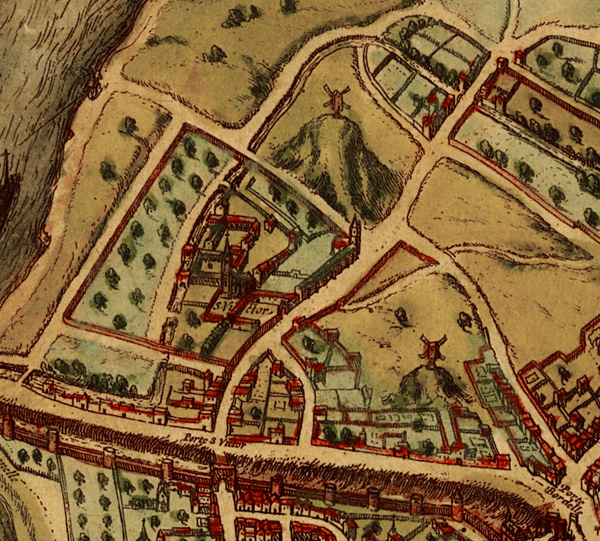 Extrait du plan montrant l'abbaye Saint-Victor de Paris. Le moulin en haut au centre est le moulin d'Ivry juste à côté du château des Rentiers, à l'endroit de l'actuelle rue du château des Rentiers près de la Porte d'Ivry (sur la butte des Coupeaux ?). Celui plus bas à droite est sur la Butte-aux-Cailles. (source : ancienne carte d'état-major sur géoportail). Le moulin de la Tournelle, ici peu distinguable des autres bâtis, est plus clairement vu sur ce plan ; c'est le moulin à eau qui se trouve très près de la confluence de la Bièvre - à la Tournelle, nom resté au pont et au quai du même nom face à l'île Saint-Louis. ( Extrait du plan de Munser 1572.